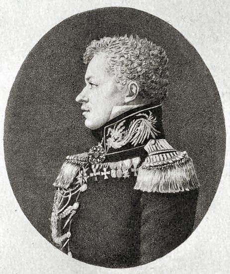 Шуберт, Федор Федорович